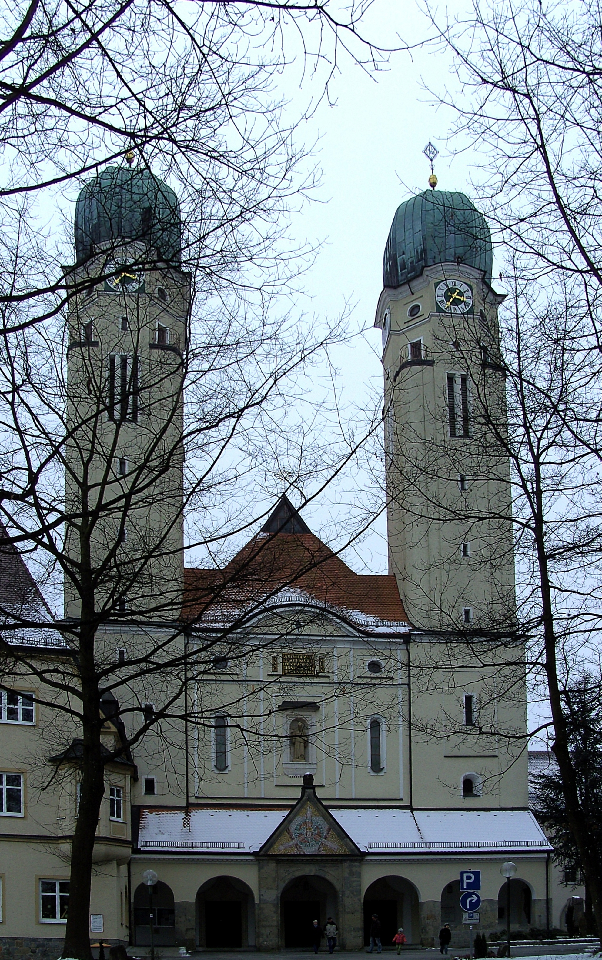 Vorderansicht der Abtei Schweiklberg